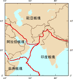 巴基斯坦板塊圖。